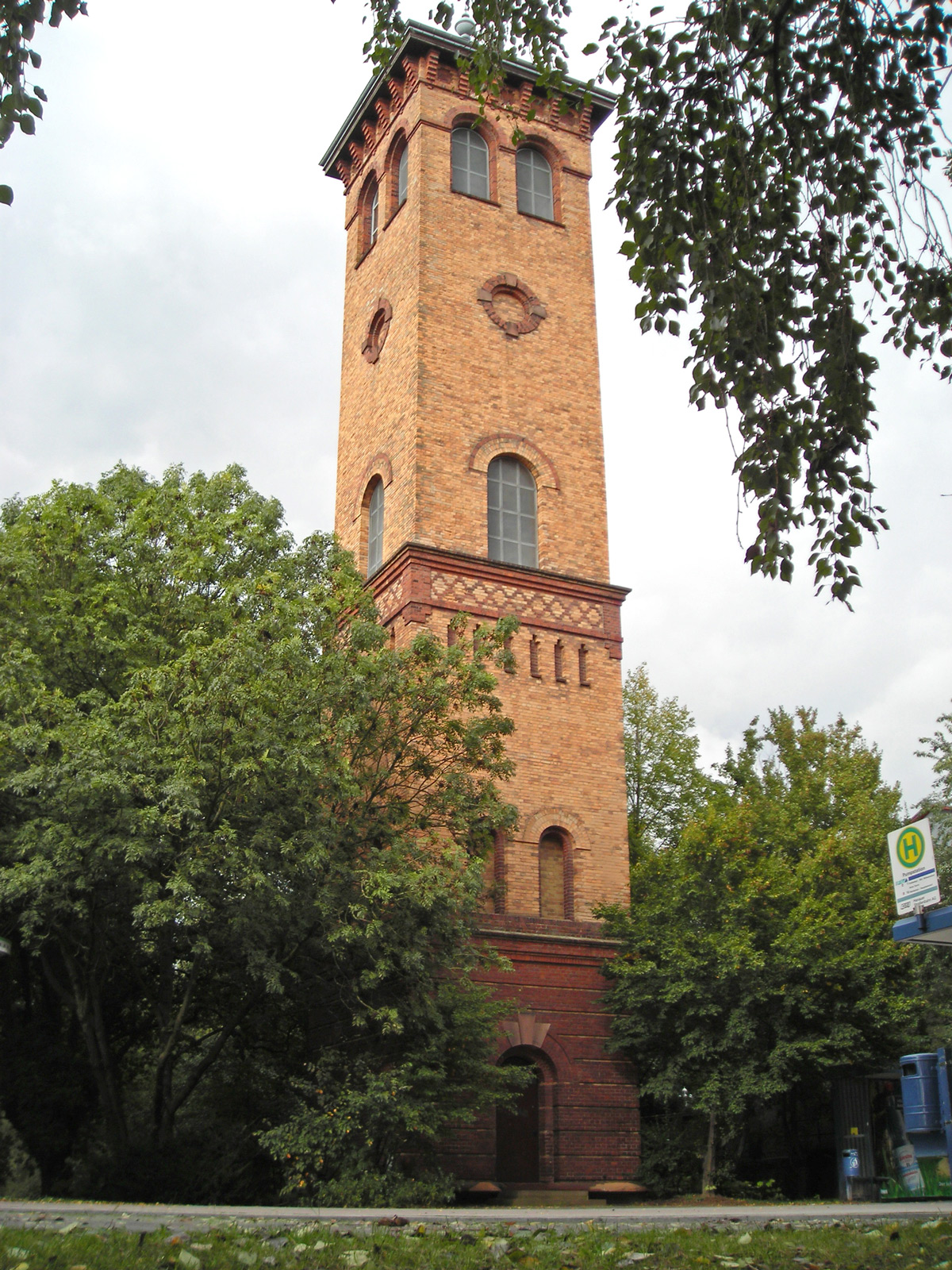 Alter Wasserturm an der Philippsruher Allee in Hanau